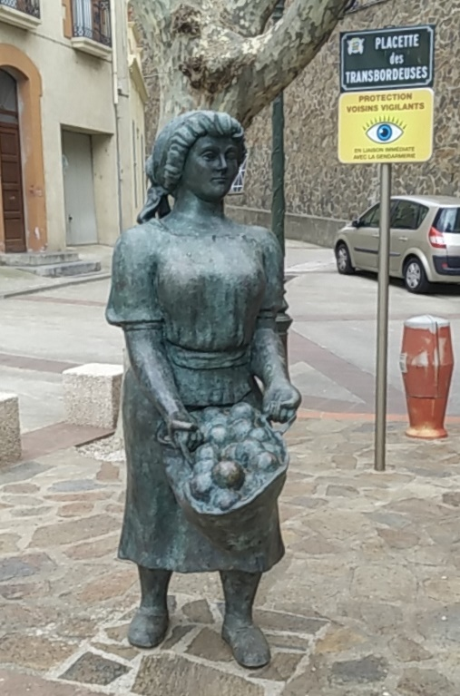 Escultura de les Trnasbordadores a la placeta d'aquest nom, a Cervera de la Marenda